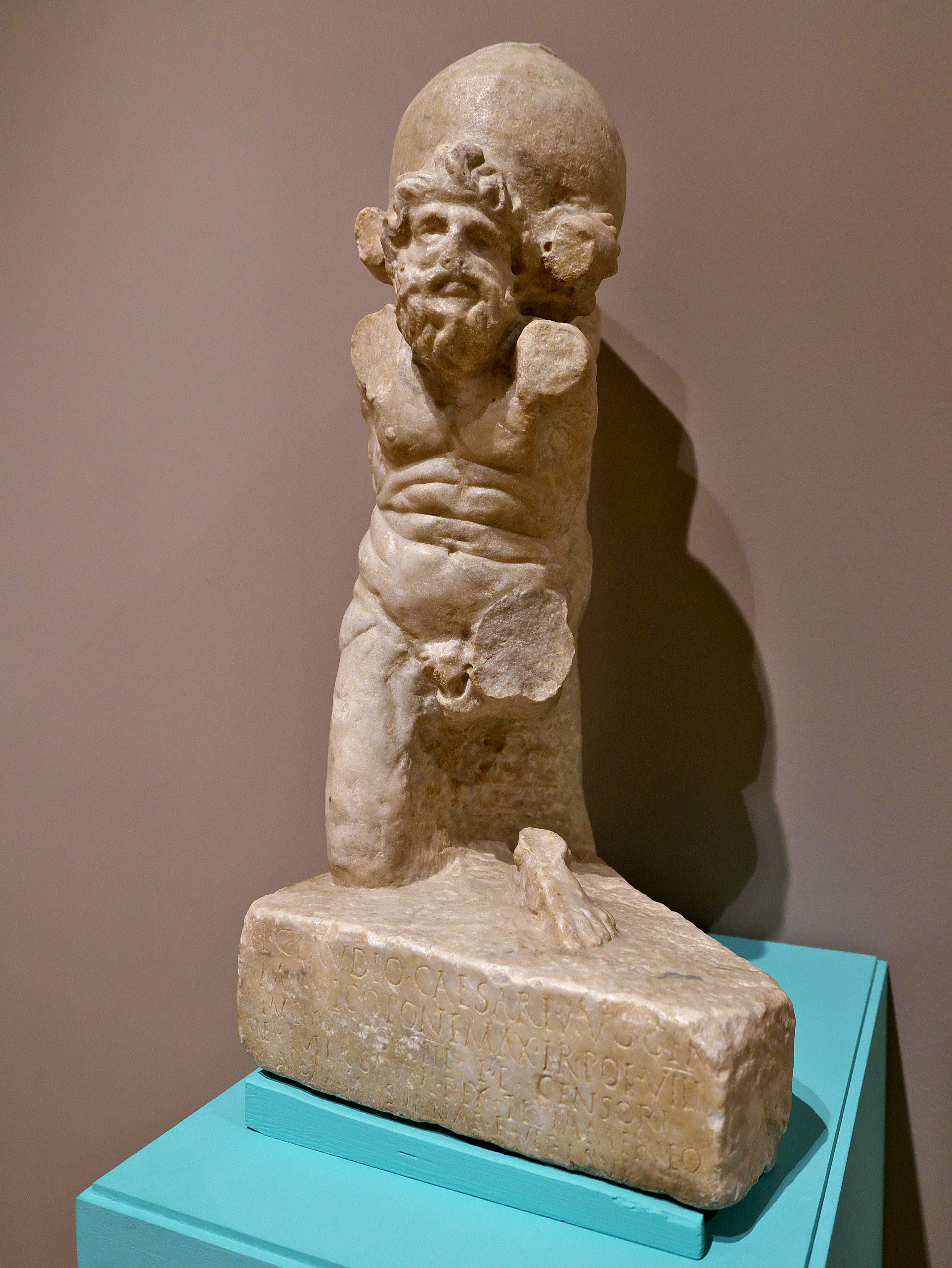 Museo Arqueológico de Sevilla. Atlas de mármol de Carrara, portando el orbe sobre los hombros, con apoyo en un árbol y una rodilla en tierra. Procedente (1762) de la Iglesia de San Juan Bautista (Las Cabezas de San Juan), lugar de la romana Conobaria. Datada en el 49 d.C., dedicada a Tiberio Claudio César Augusto Germánico.